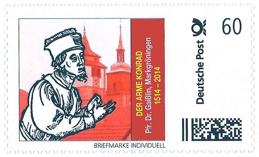 Der Arme Konrad in Markgröningen